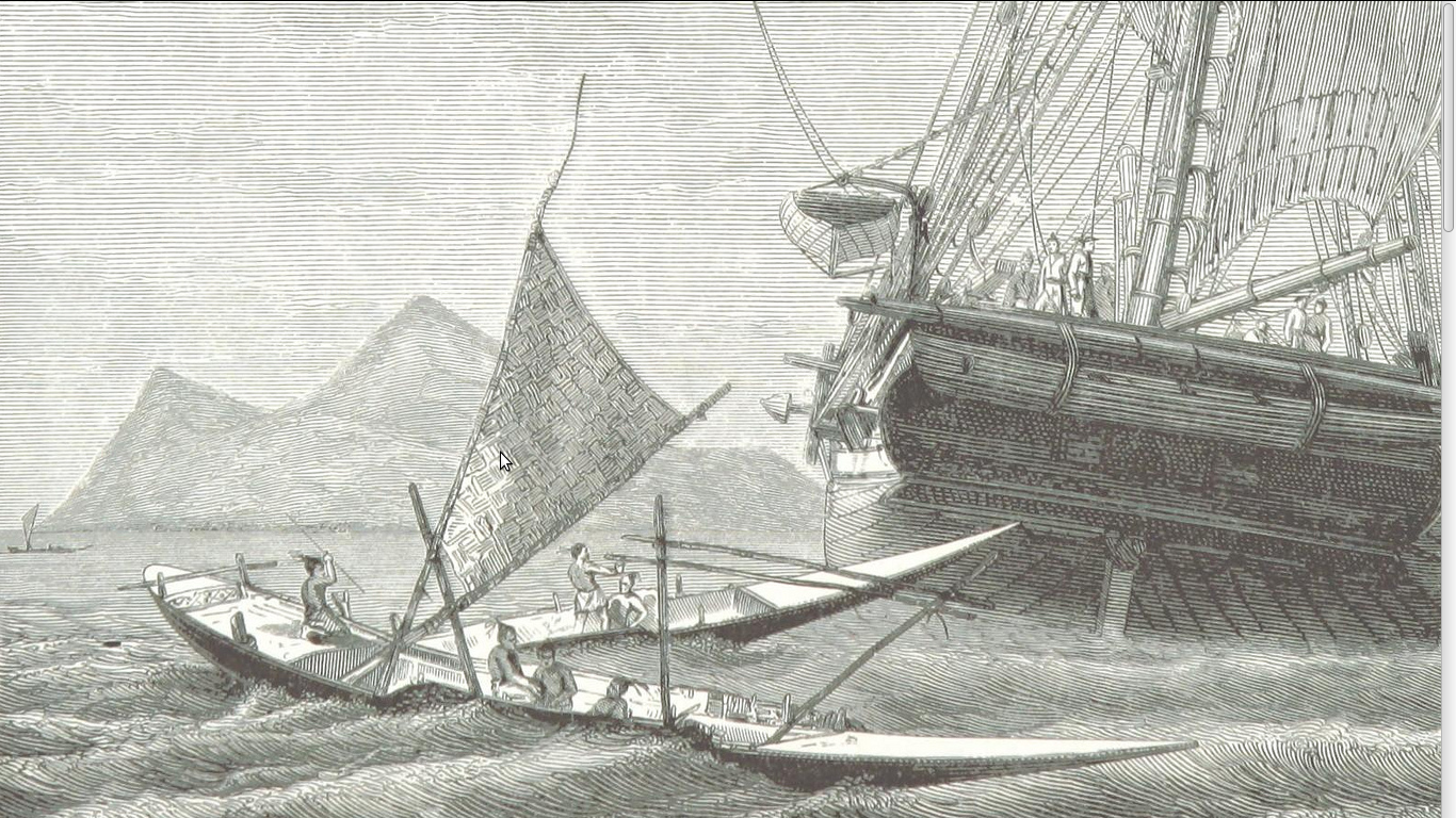 Voyages et Découvertes outre-mer au XIXe siècle, Arthur Mangin, Illustrations par Durand-Brager, page 160.